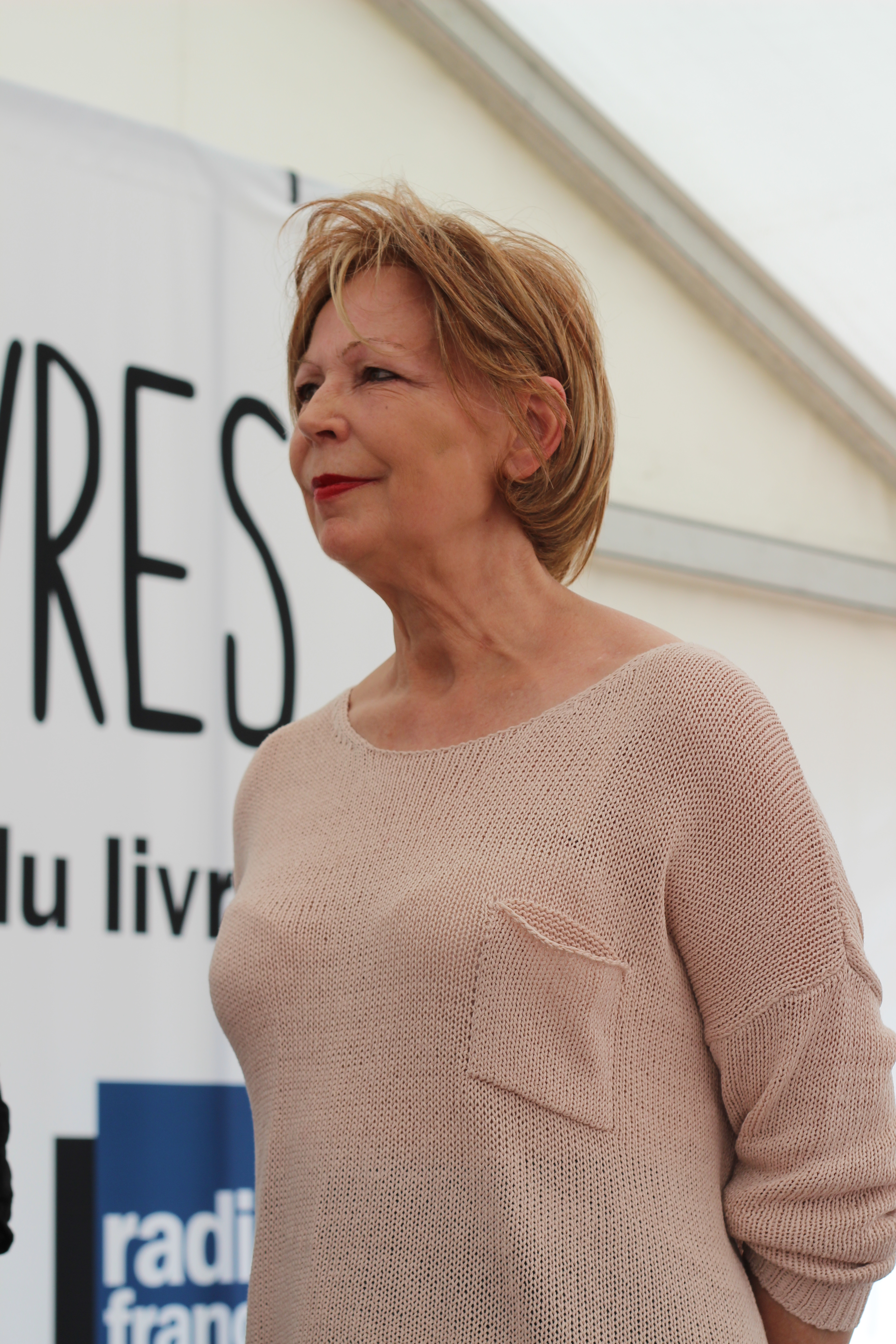 Lydie Salvayre au Livre sur la Place 2014